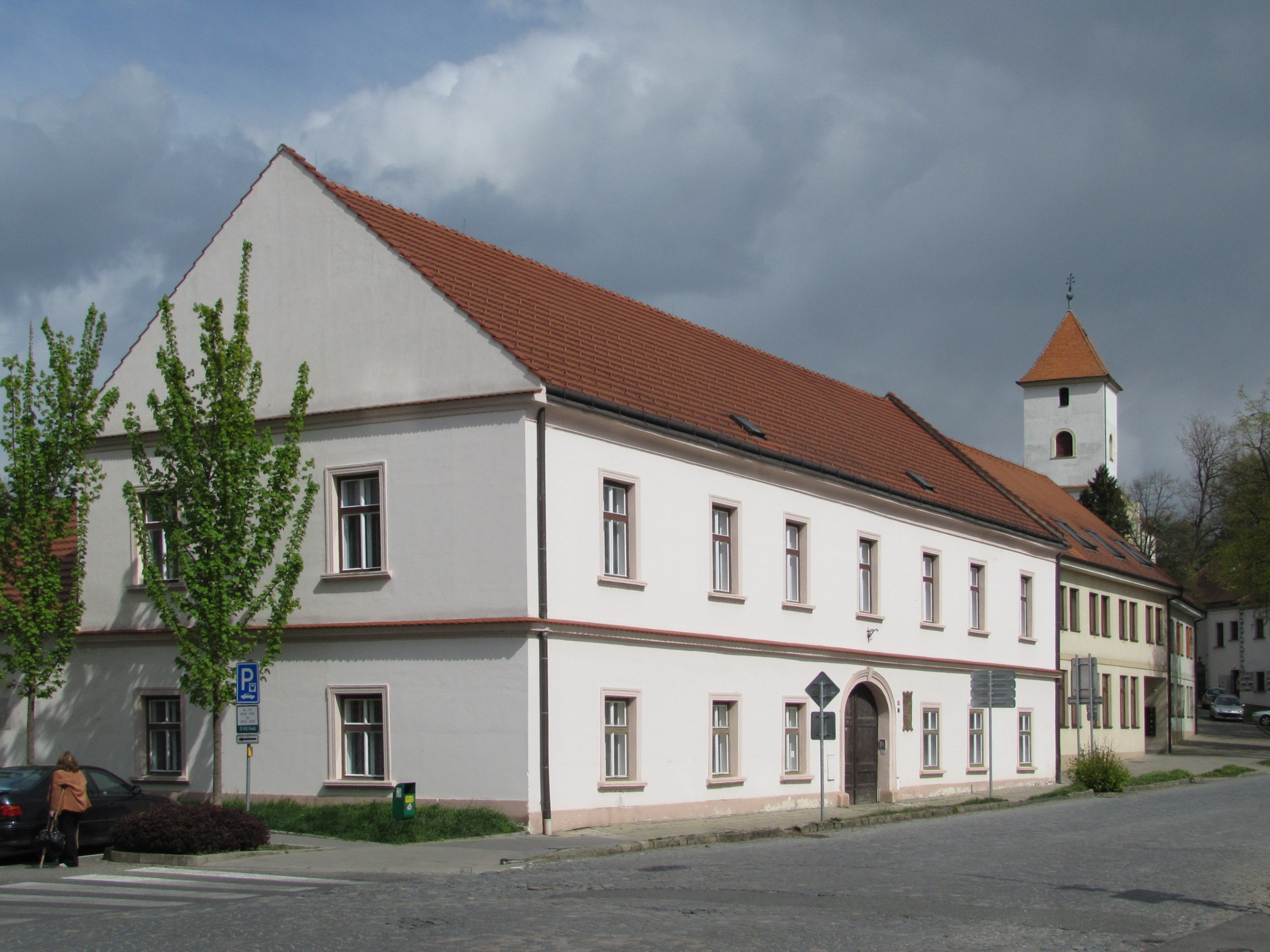 Římskokatolická fara na Palackého ulici v Kyjově